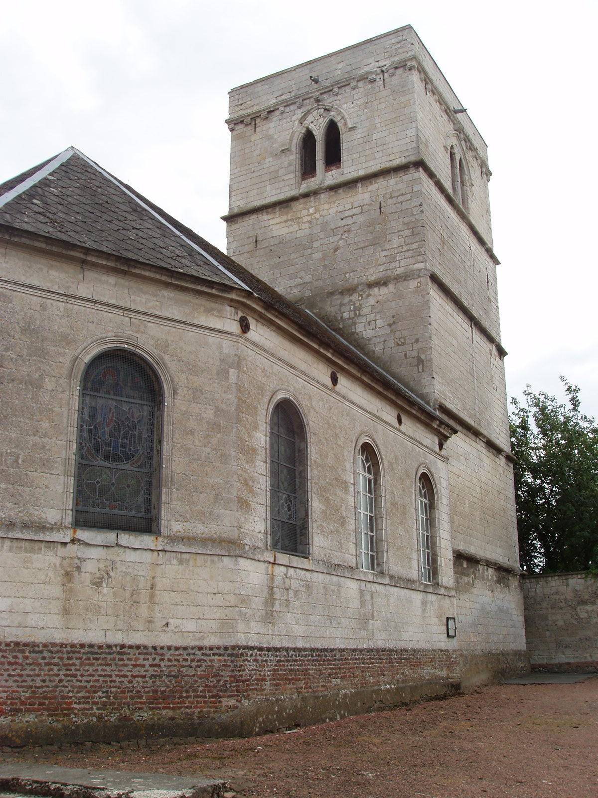 Commune française de Montenescourt dans le département du Pas-de-Calais en France - Église